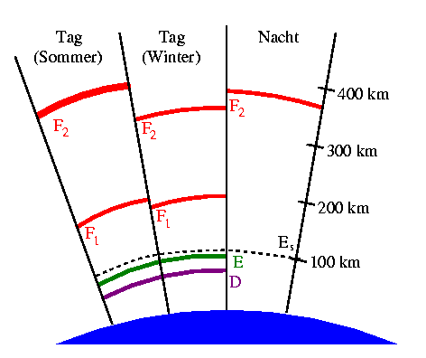 Aufbau der Ionosphärenschichten. Selbst gezeichnet